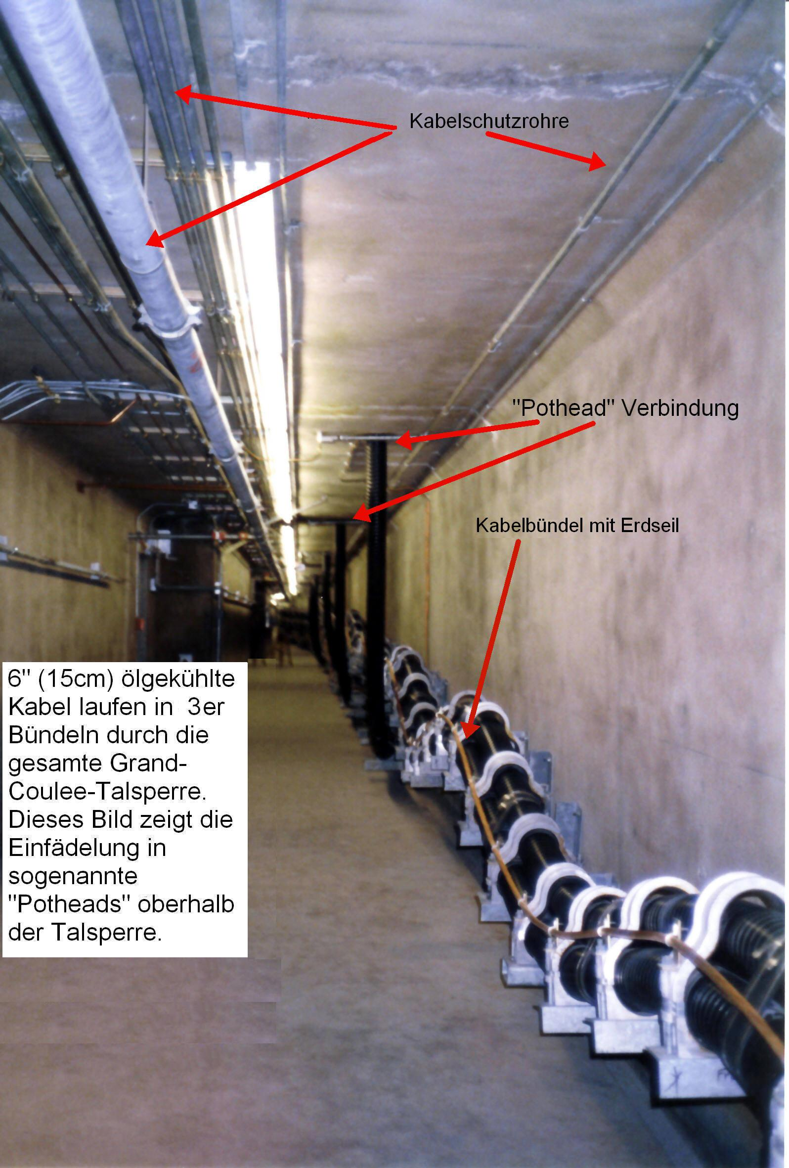 15 cm Außendurchmesser ölgekühlte Kabel, die in Dreierbündeln die gesamte Grand-Coulee-Talsperre durchlaufen. Dieses Bild zeigt den Einlauf in die "Potheads" (Verteiler) überhalb der Talsperre. Nachträglich wurden dort Schotten aus Brandschutz-Mörtel eingebaut. Sollte ein Kabel ausschlagen, wird automatisch die Ölzufuhr abgestellt, um einem weiteren Kohlenwasserstoff-Feuer den Brennstoff zu verweigern.